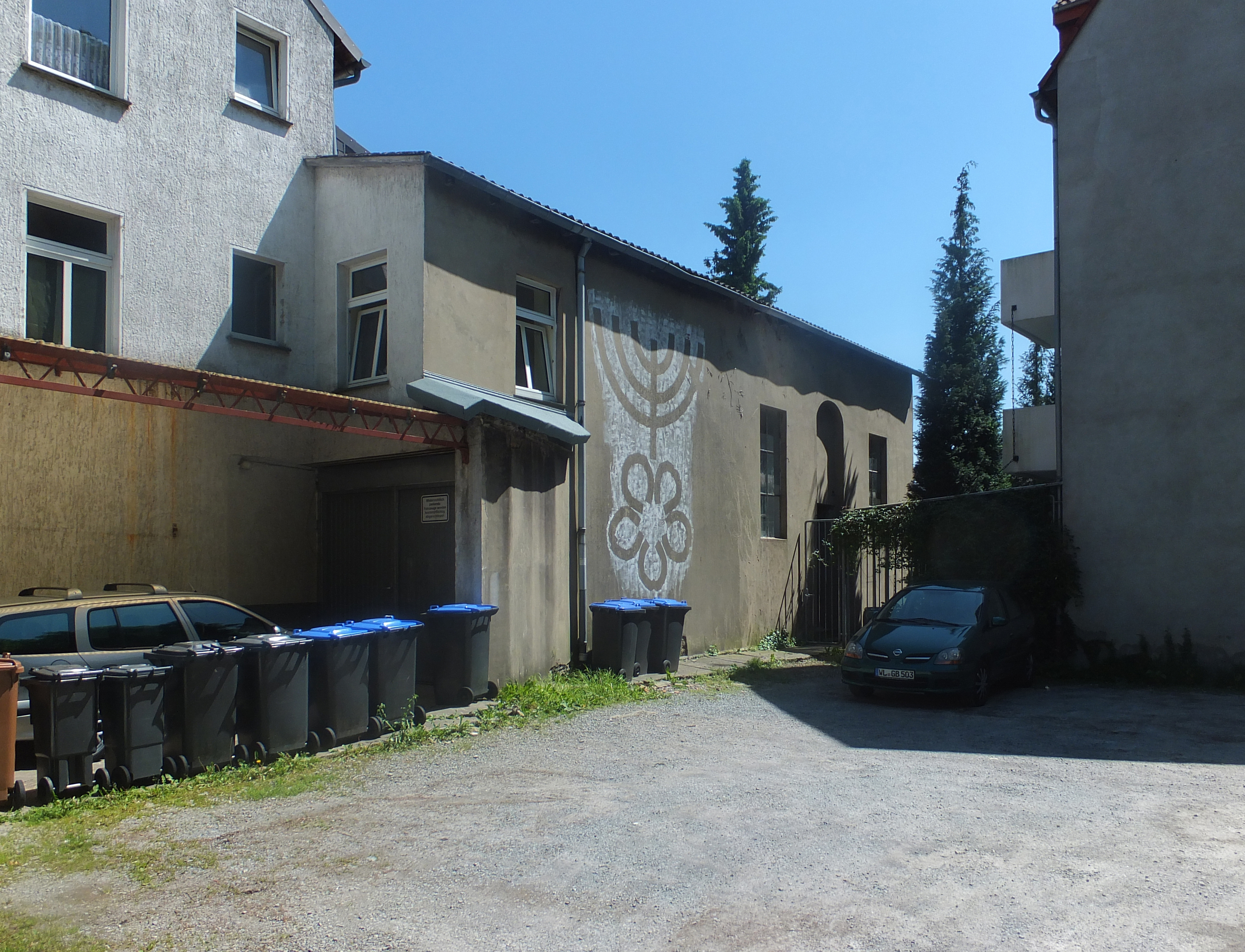 Reste der ehemaligen Synagoge in Lippstadt